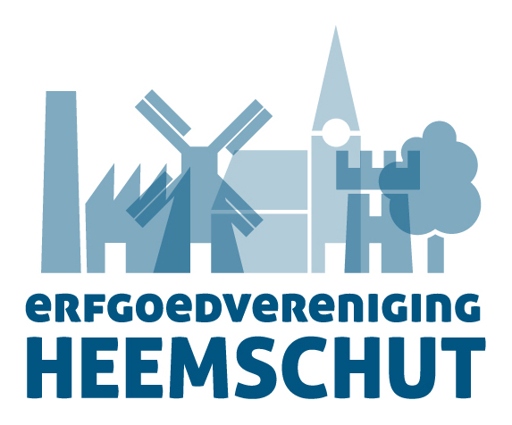 Logo Erfgoedvereniging Heemschut